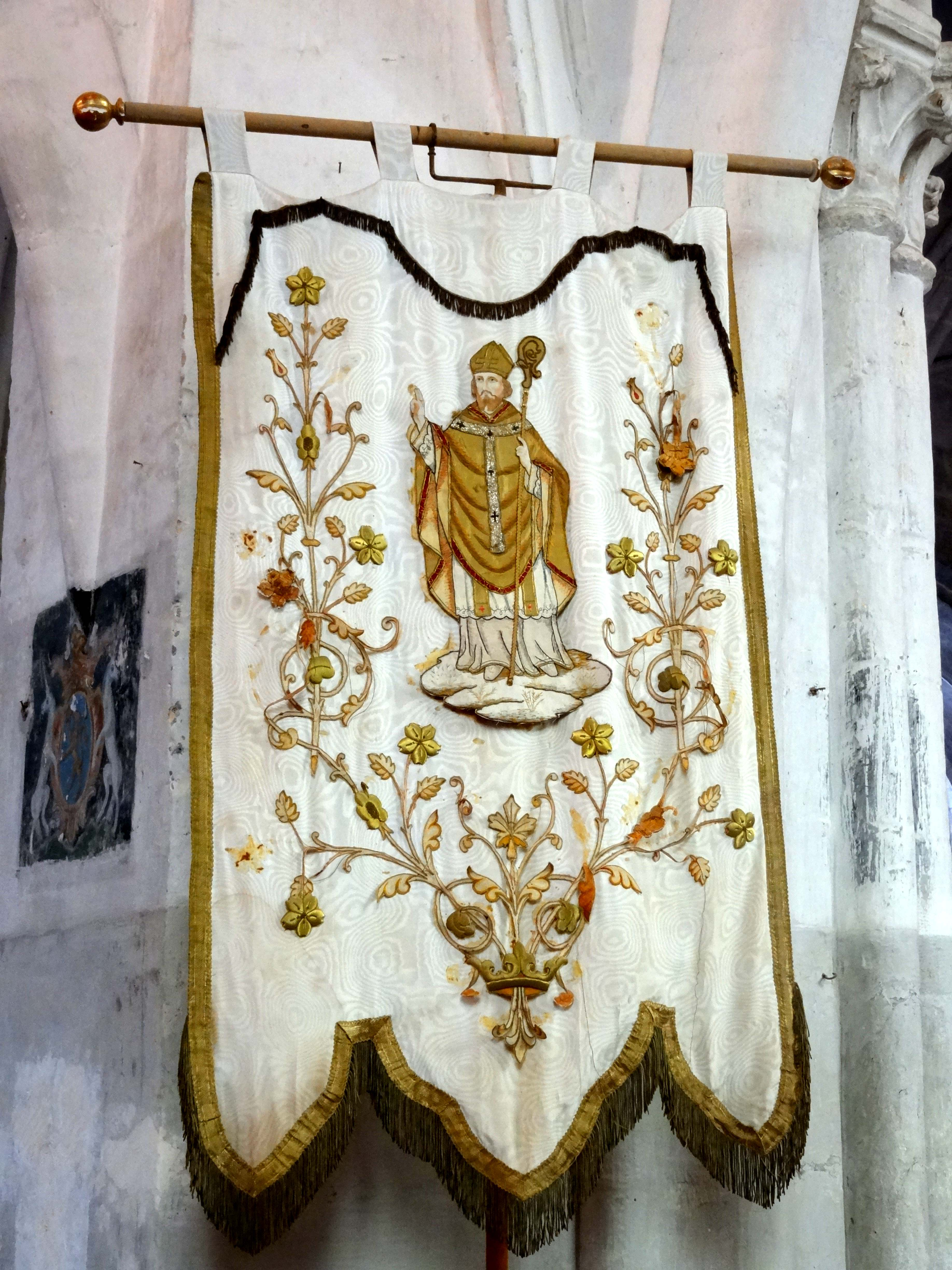 Mobilier de l'église - voir titre.